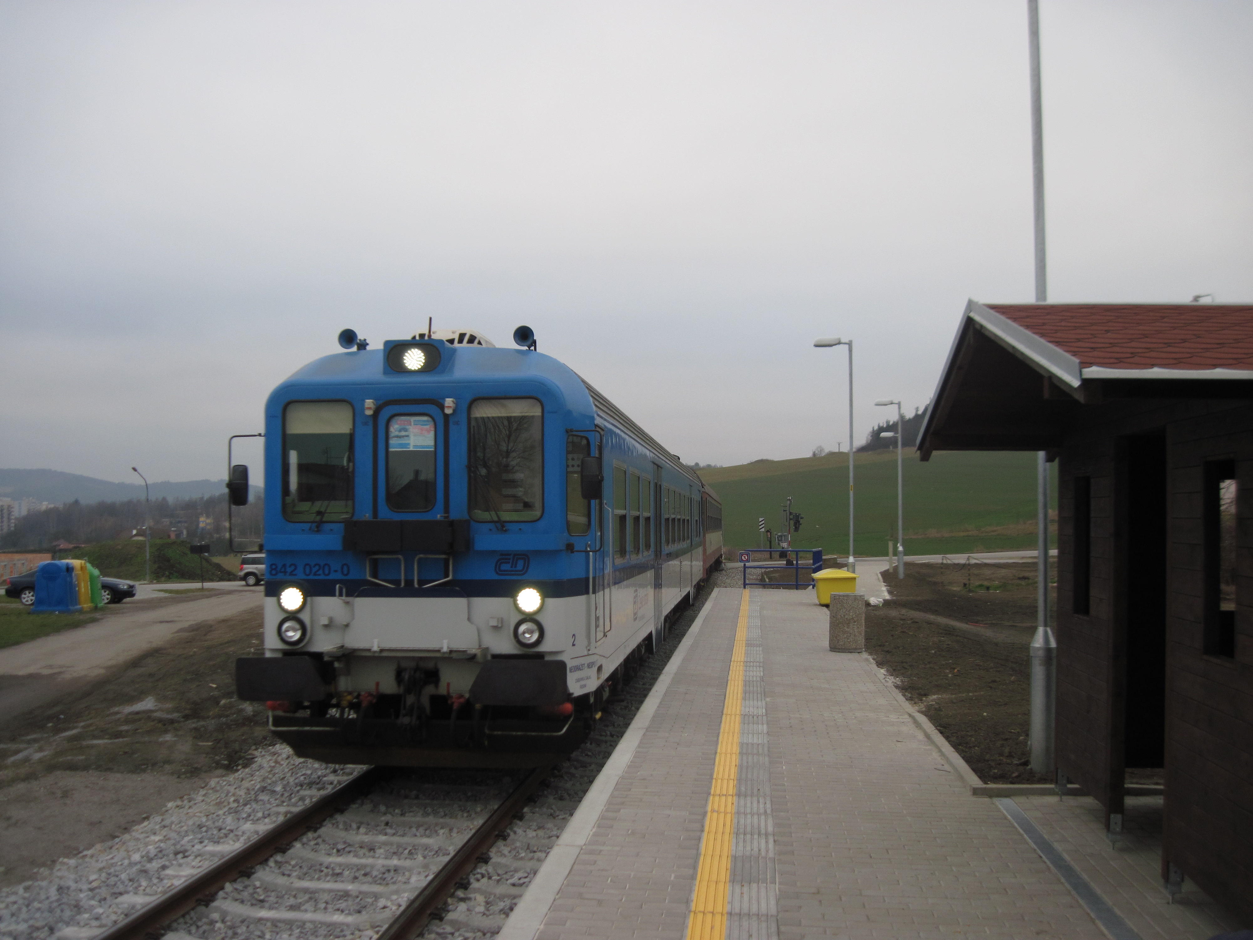 železniční zastávka Domoradice